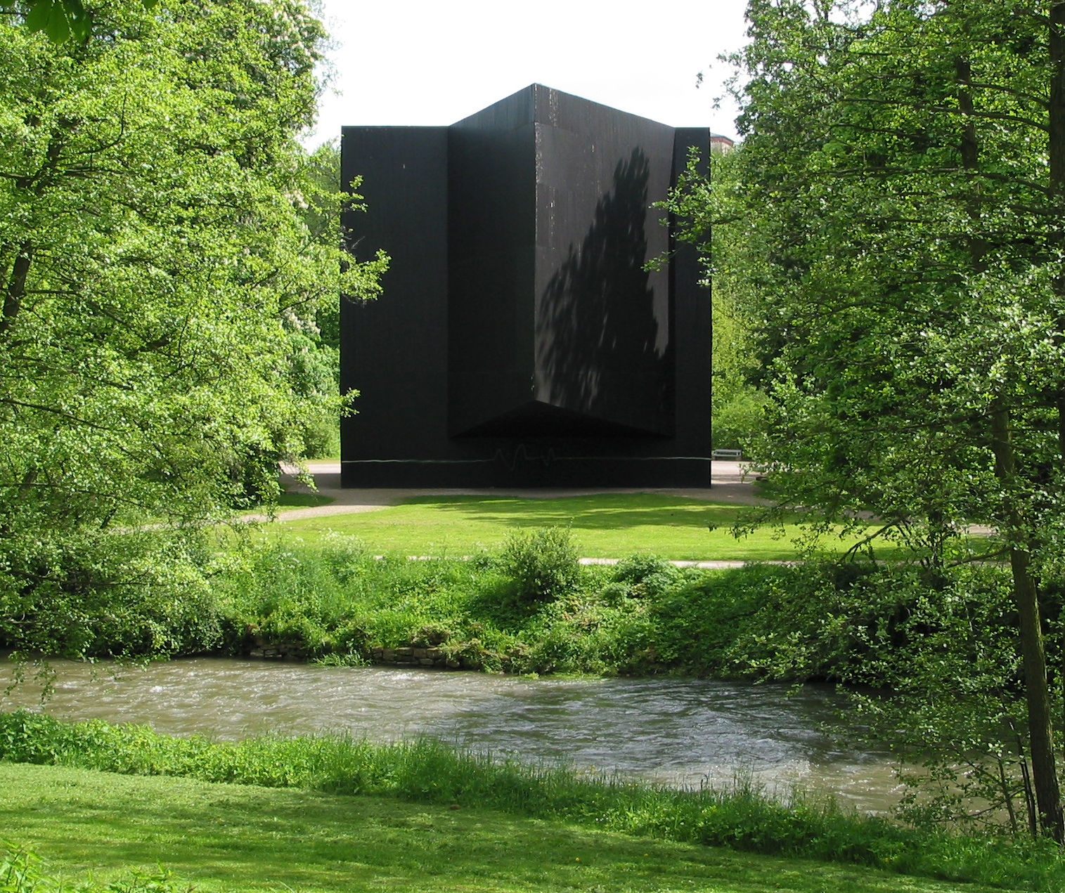 Westansicht des Theater-Kubus am Stern im Park an der Ilm in Weimar. Er wurde im Kulturstadtjahr 1999 aufgestellt und als ergänzende Spielstätte genutzt. Später wurde er wieder entfernt. Im Vordergrund ist die fließende Ilm zu sehen.